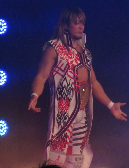 2013年9月29日 神戸・ワールド記念ホール「DESTRUCTION」 棚橋弘至